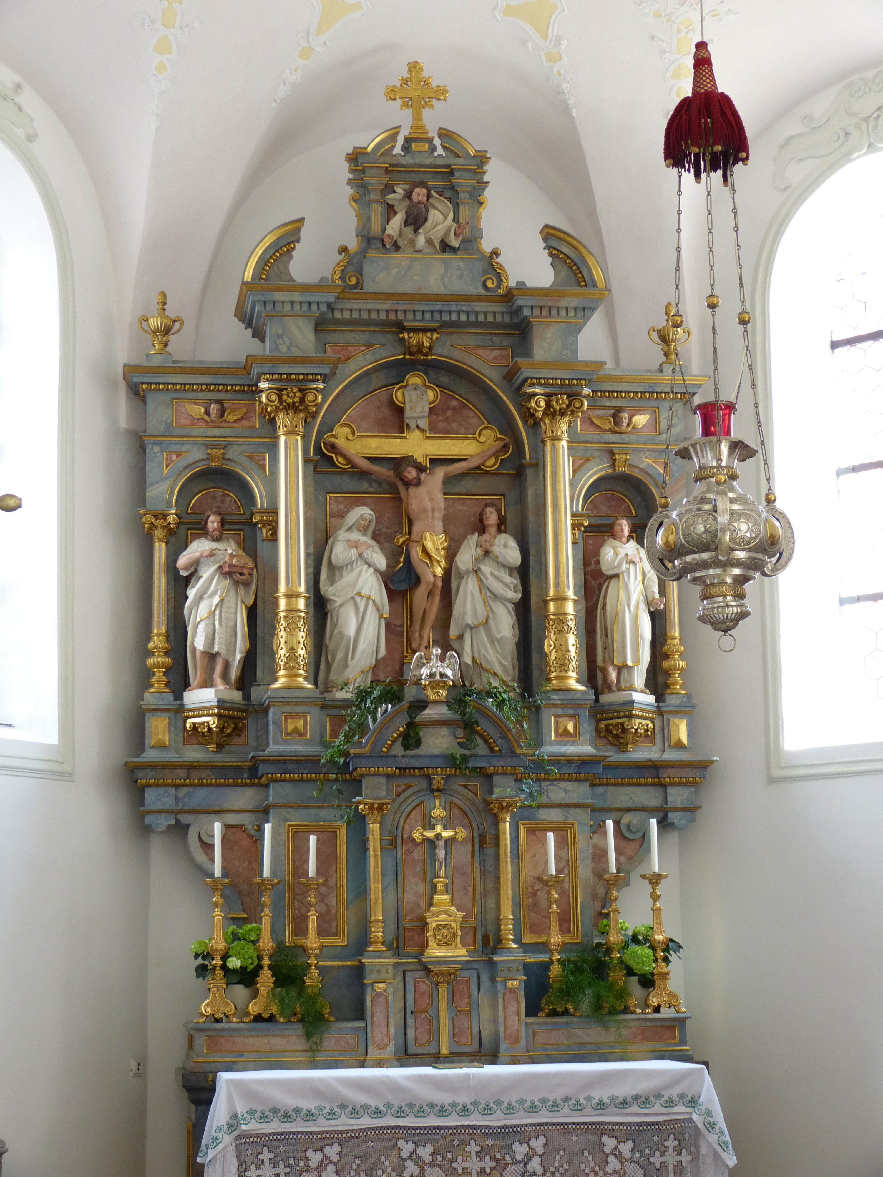 St. Johannes Baptist, Salgen, Landkreis Unterallgäu, Bayern